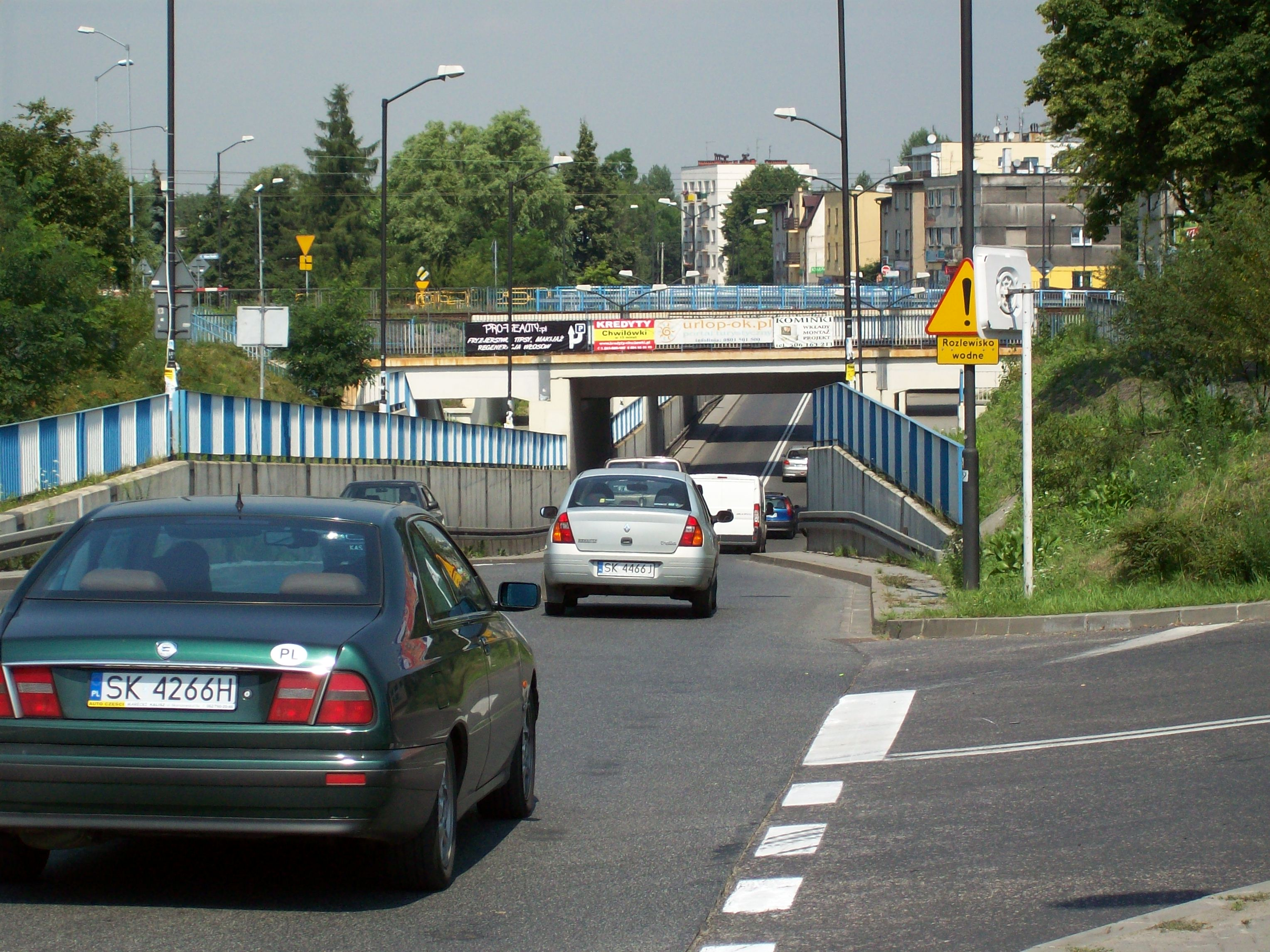 Tunel pod linią kolejową Katowice-Rybnik/Wisła Głębce w Katowicach Piotrowicach